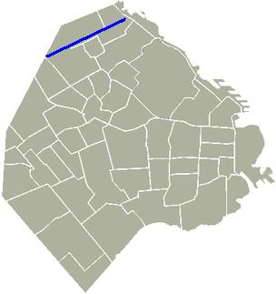 Avenida Crisólogo Larralde, Buenos Aires